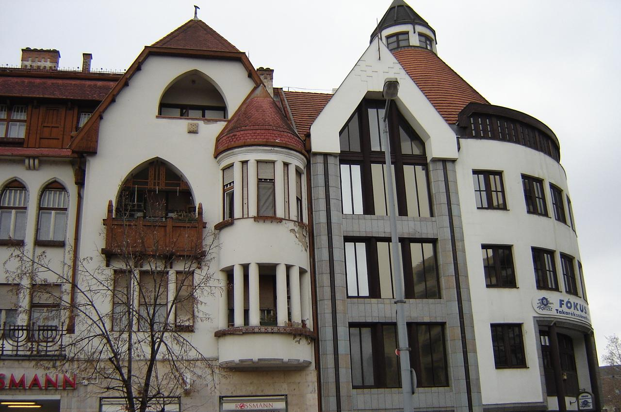 A kecskeméti Luther-palota